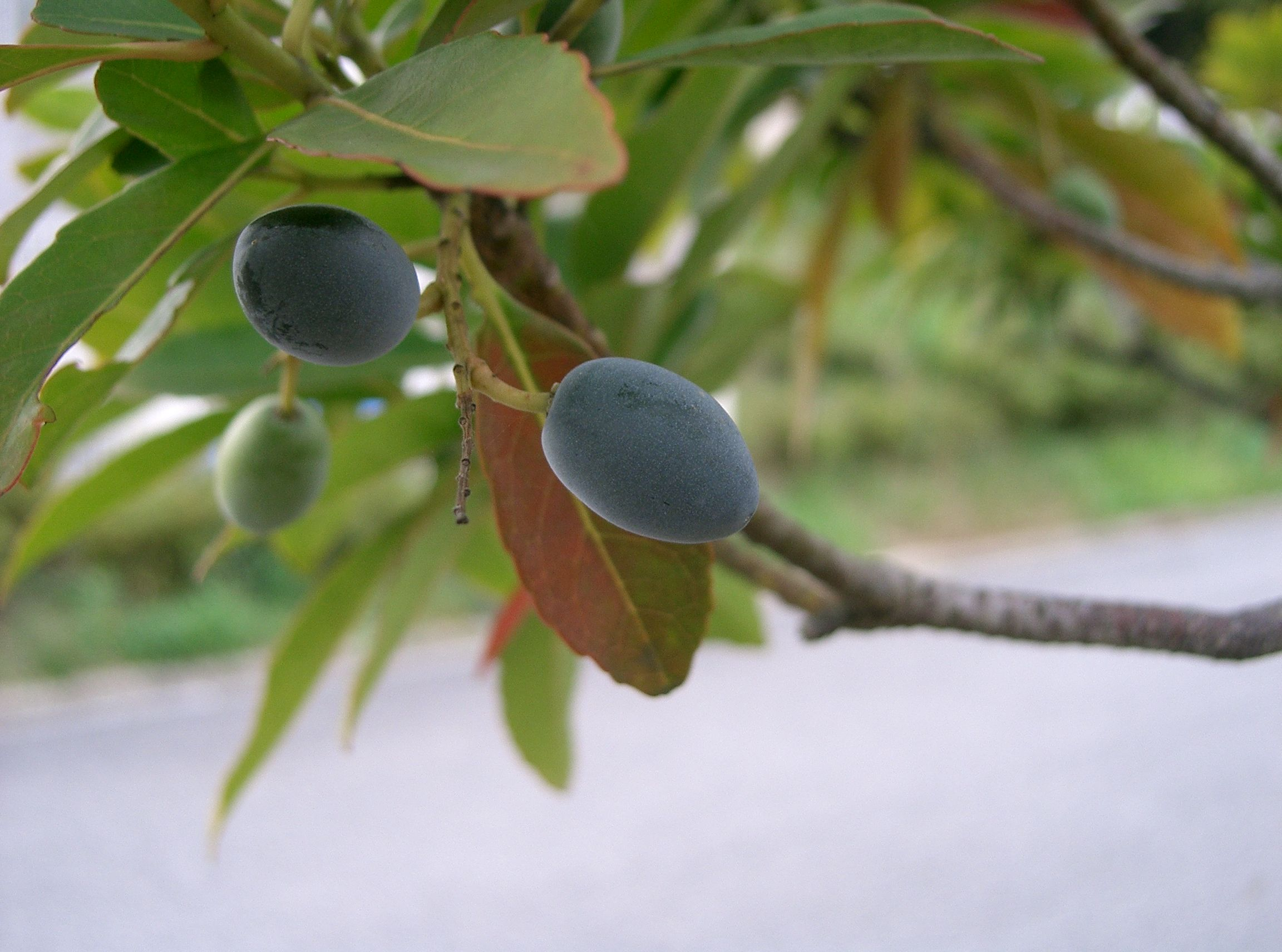 Elaeocarpus sylvestris var. ellipticus